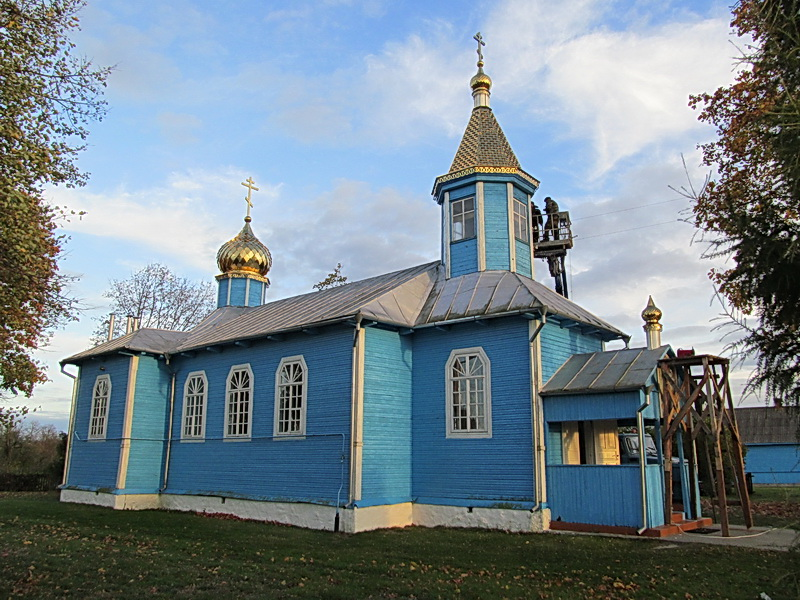 Равяцічы. Свята-Пакроўская царква